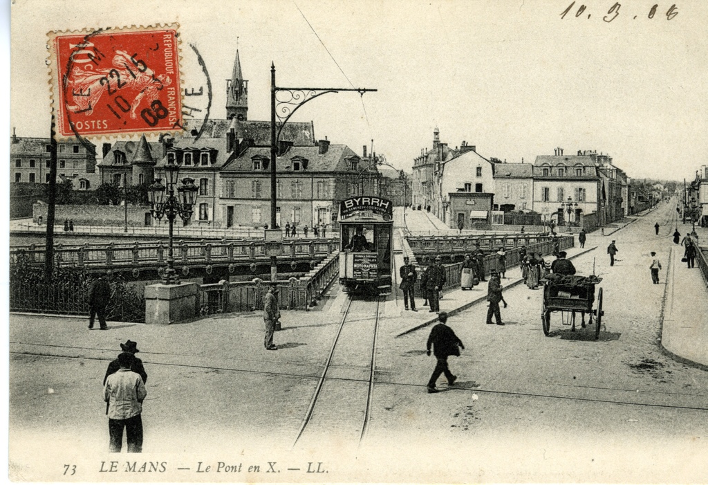 Carte postale ancienne éditée par LL, n°76 : Pont en X du Mans, Sarthe, France